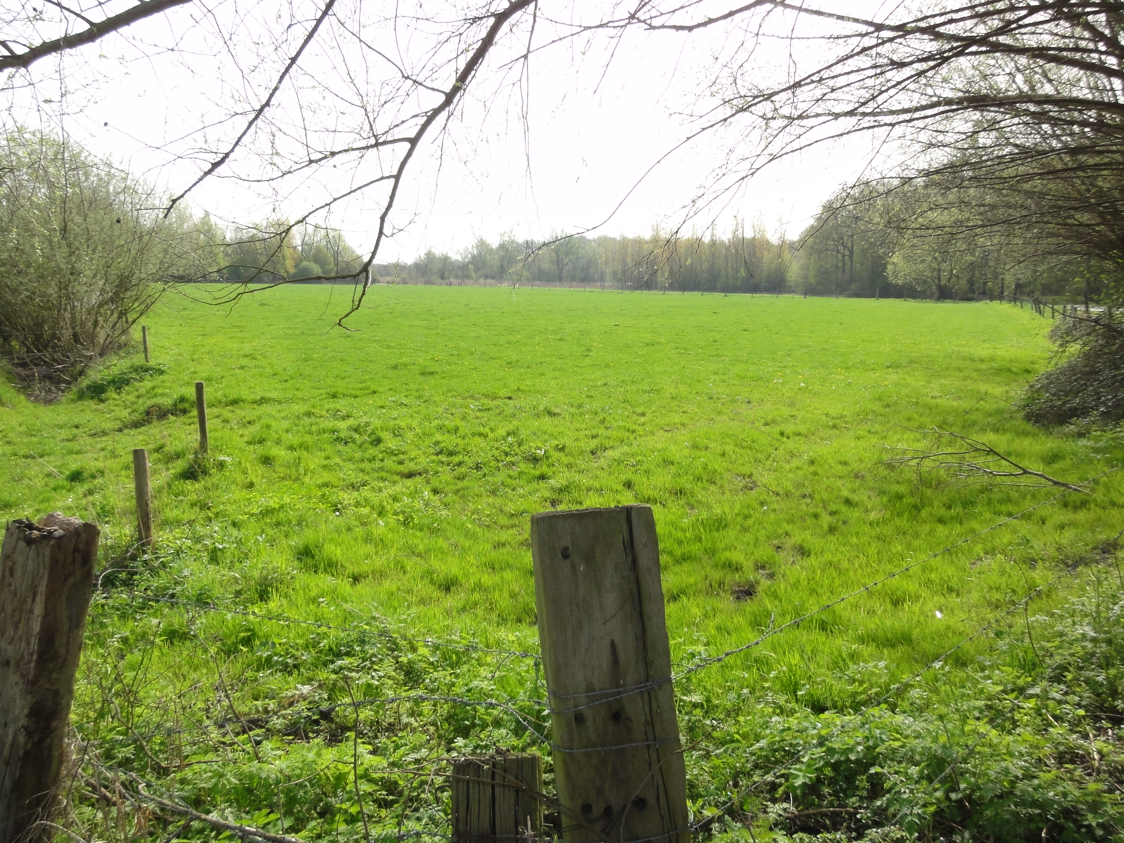 L'Avaleresse des Prés Barrés de la Compagnie d'Hasnon était un puits sans exploitation situé à Hasnon, Nord, Nord-Pas-de-Calais, France.